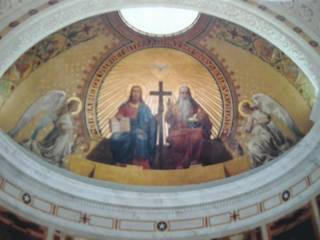 La Trinité en gloire. Toile marouflée, peinte en 1870 par Louis Émile ADAN (1839-1937). Courbevoie (Hauts-de-Seine), église paroissiale Saint Pierre-Saint Paul, abside.